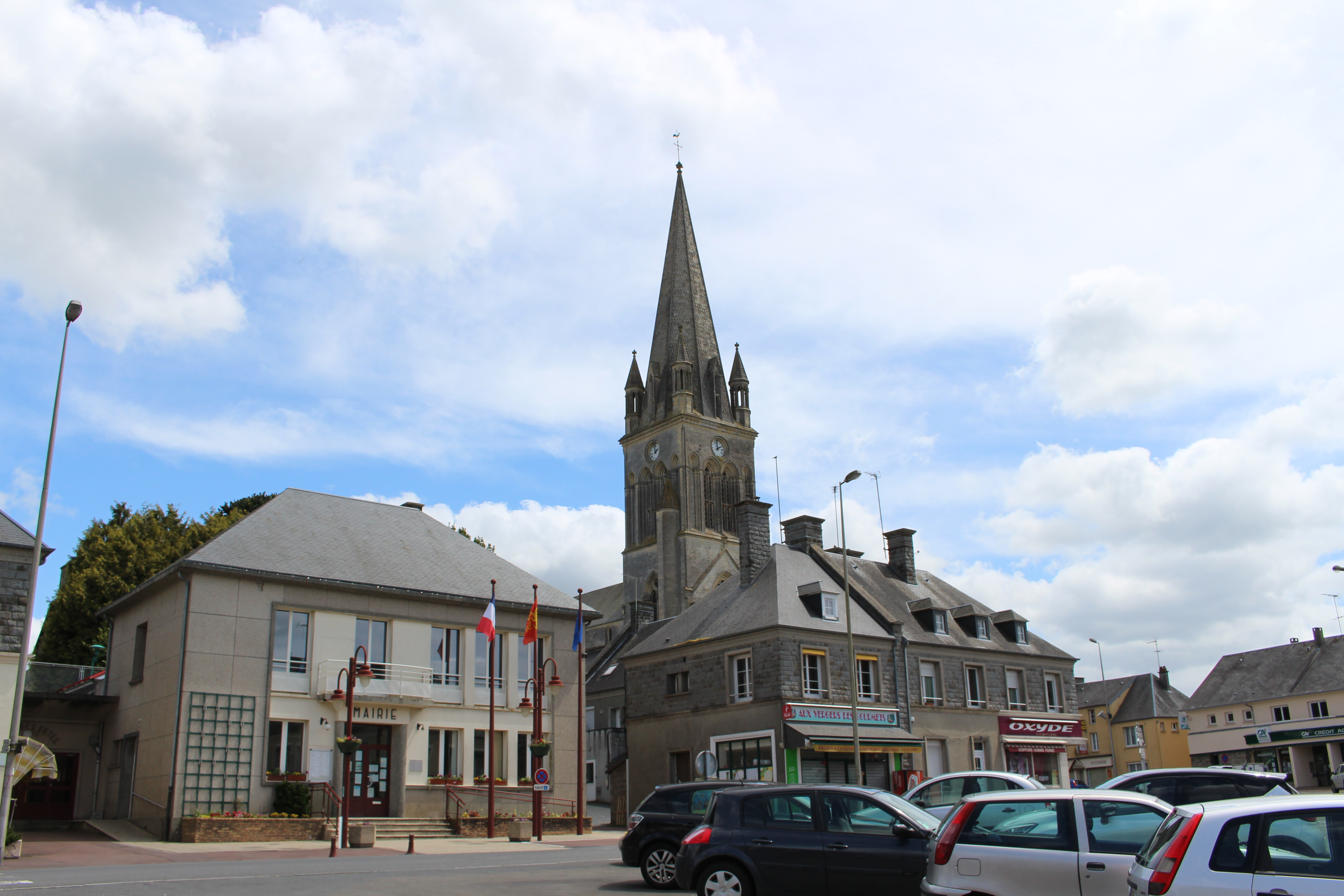 Marigny, Manche